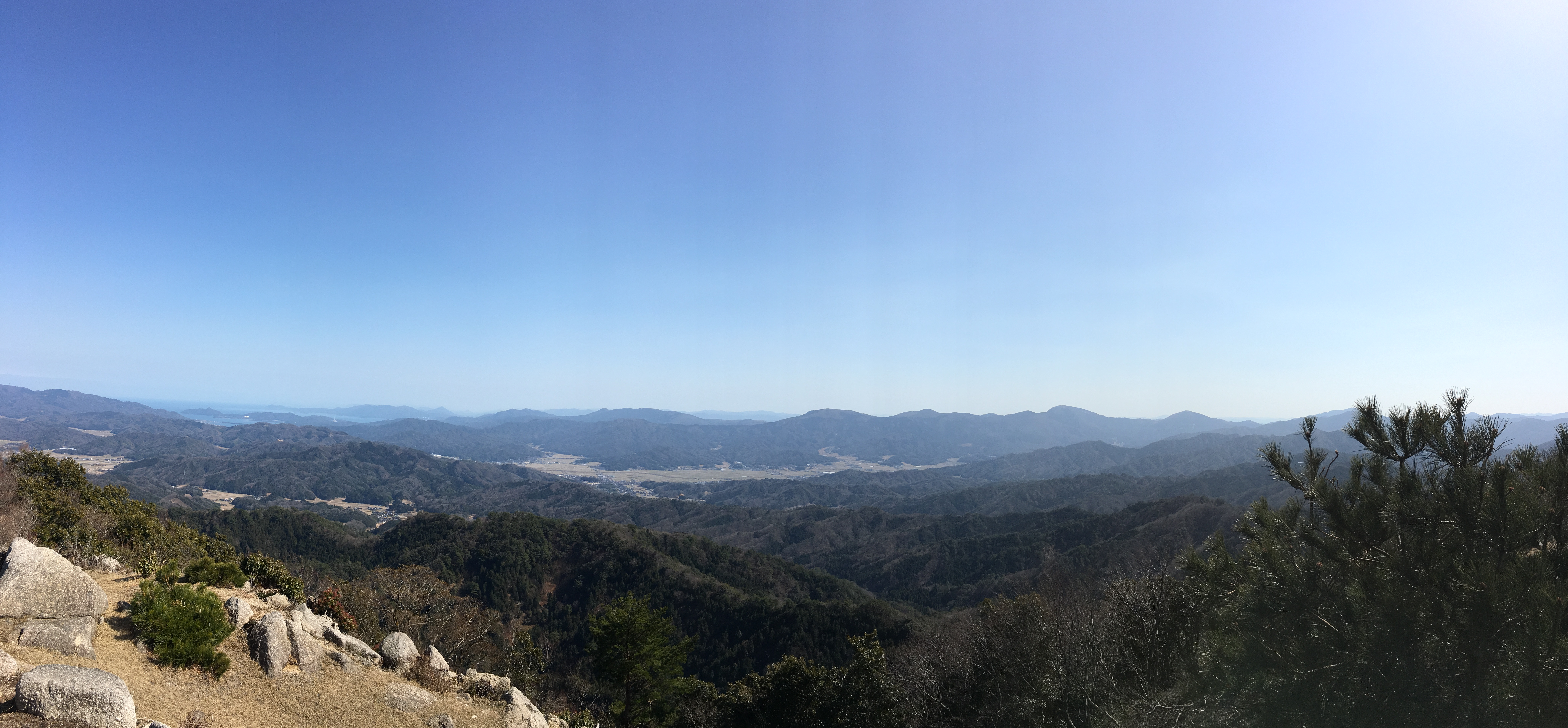 京丹後市峰山町磯砂山（いさなごさん）頂上からの眺望